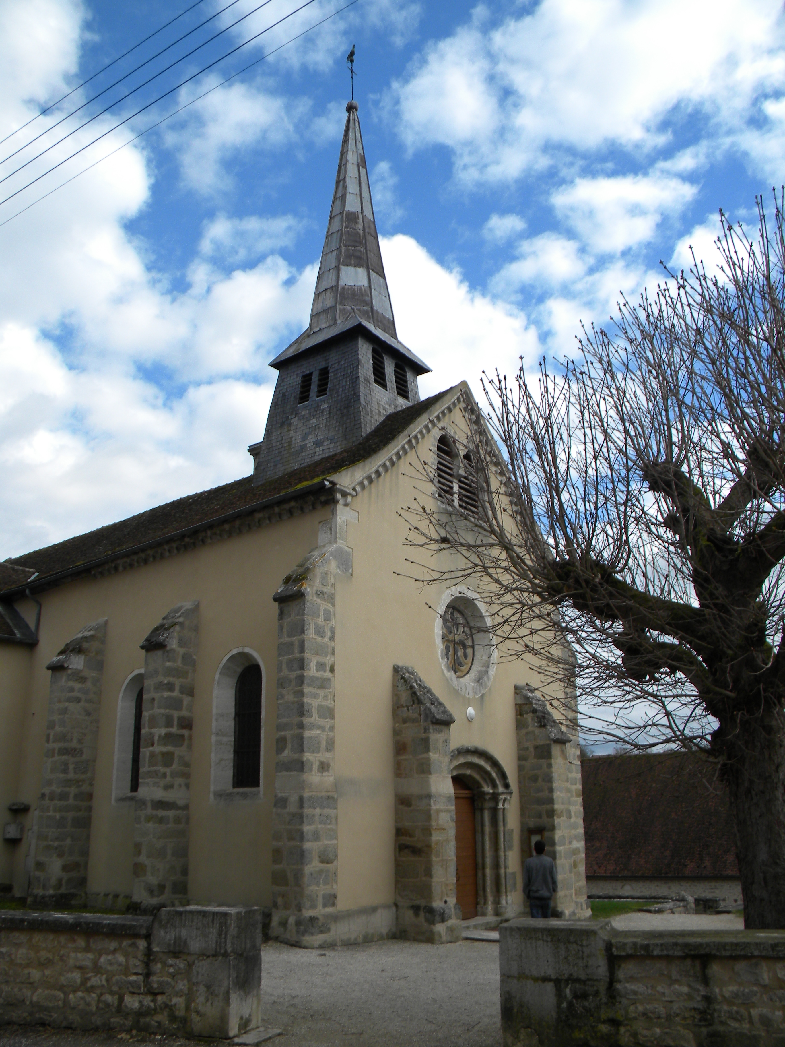 Kirko de Molinot